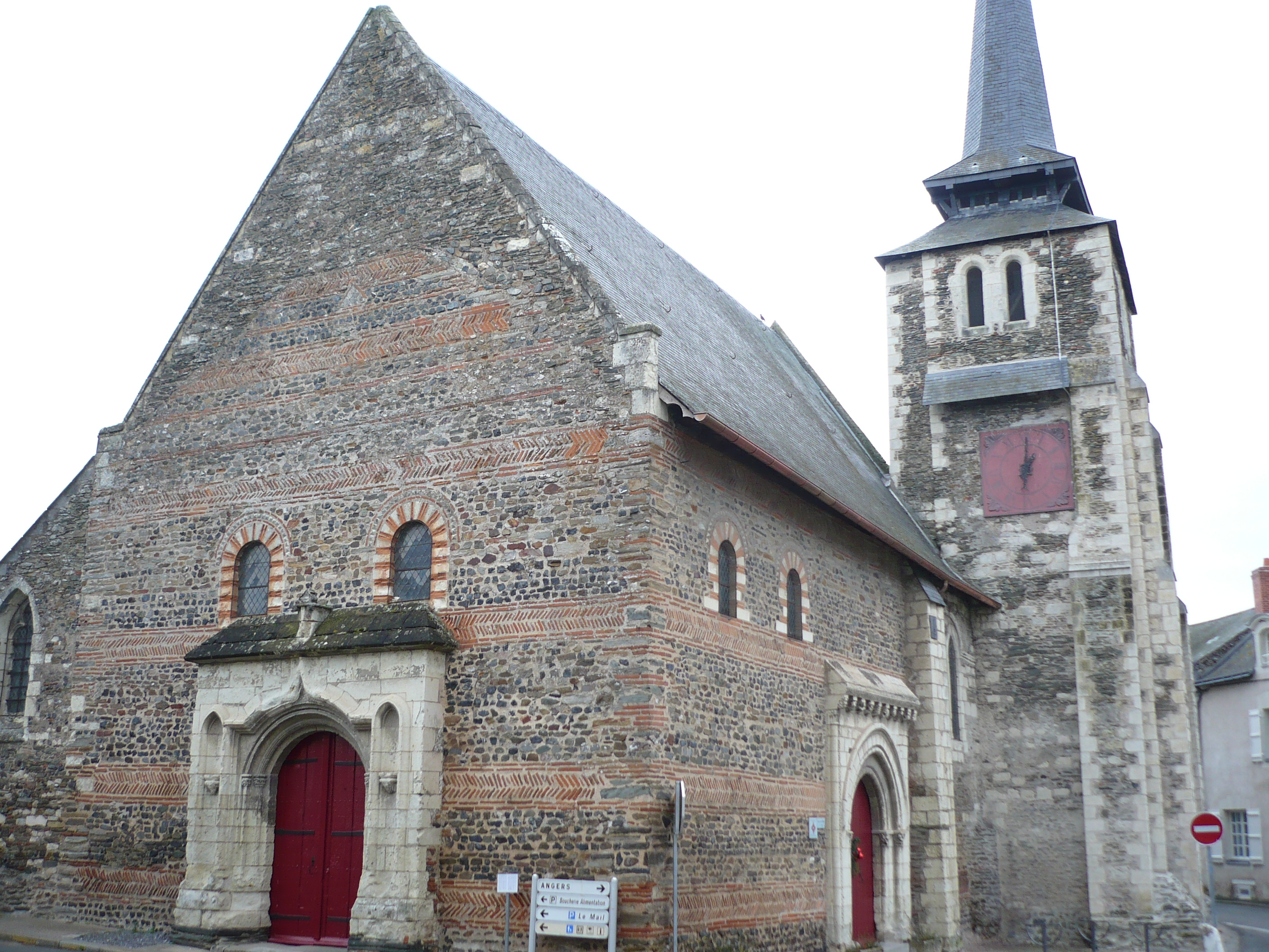 Église de Savennières (Maine-et-Loire), la nef est décorée de plusieurs assises d'appareil en arête-de-poisson en brique